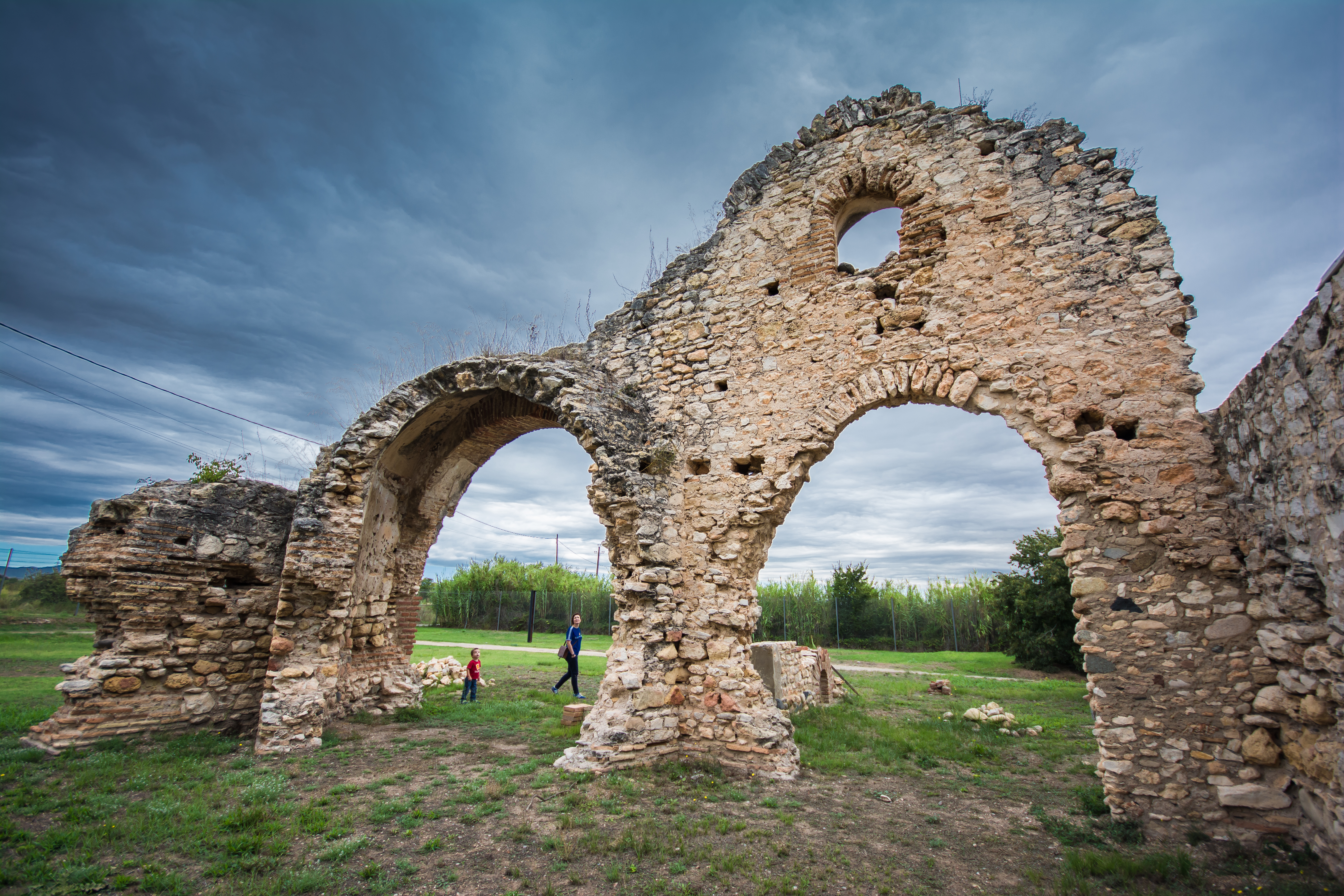 Restos del muro del tepidarium (sala de aclimatación) de las primeras termas de Centcelles.